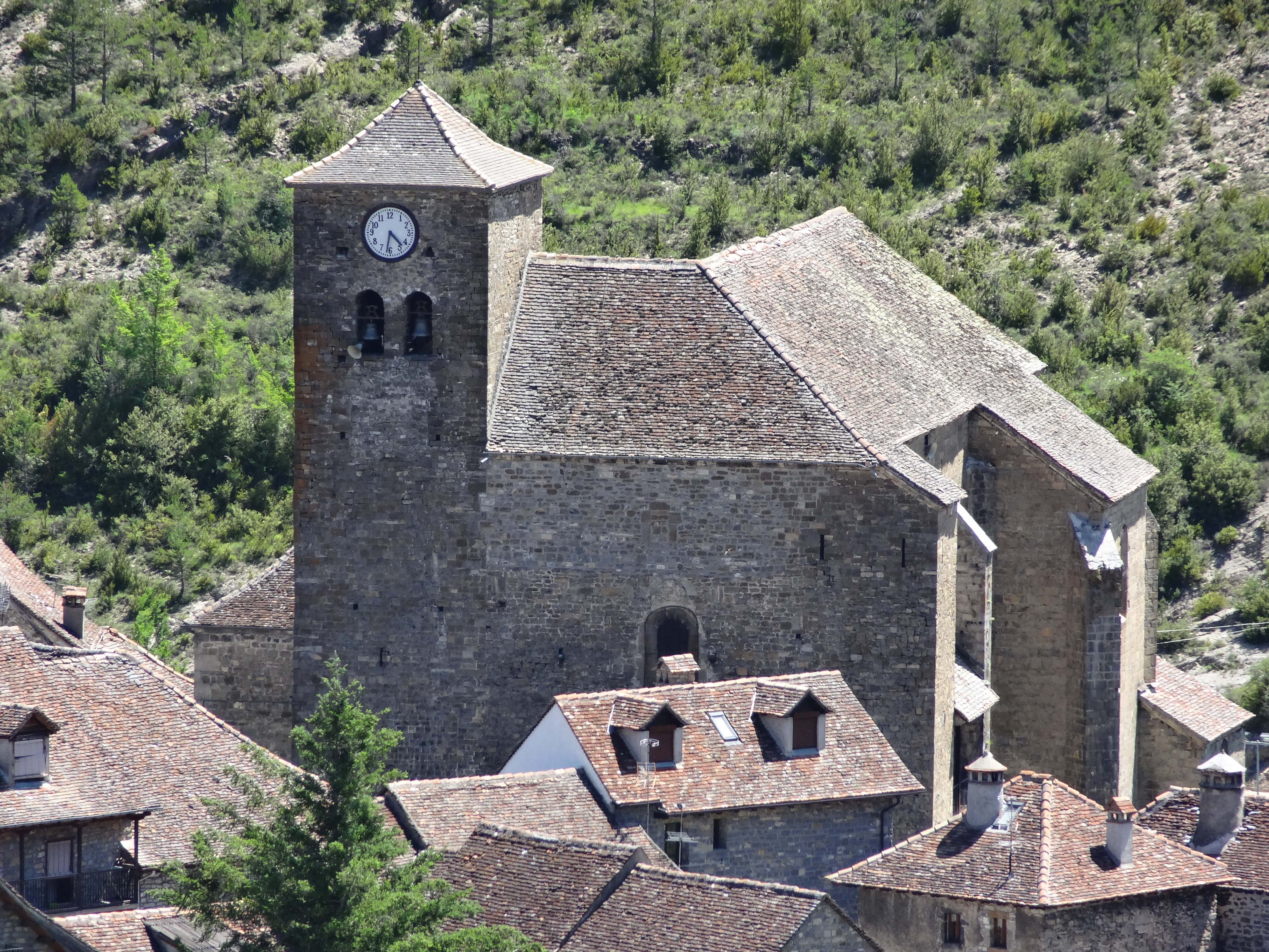 Iglesia de San Pedro de Ansó